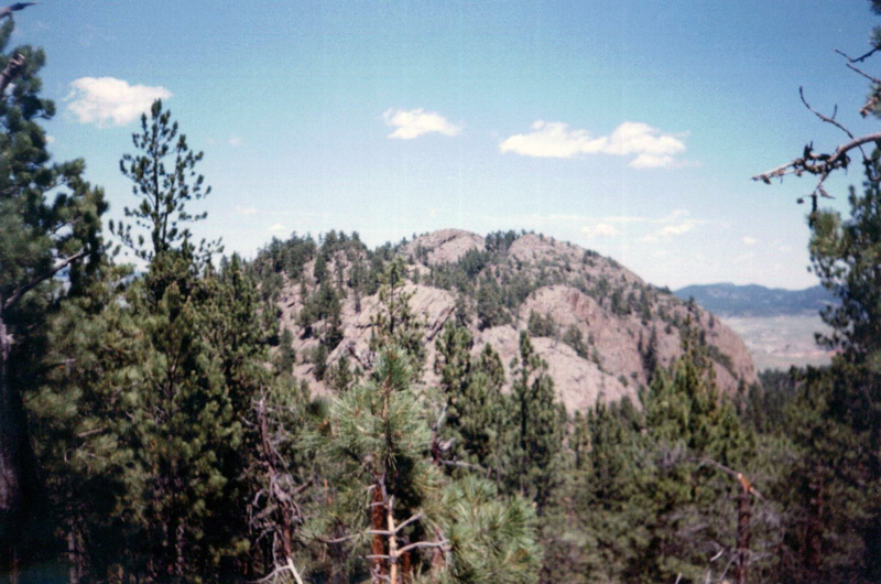 Inyan Kara mountain